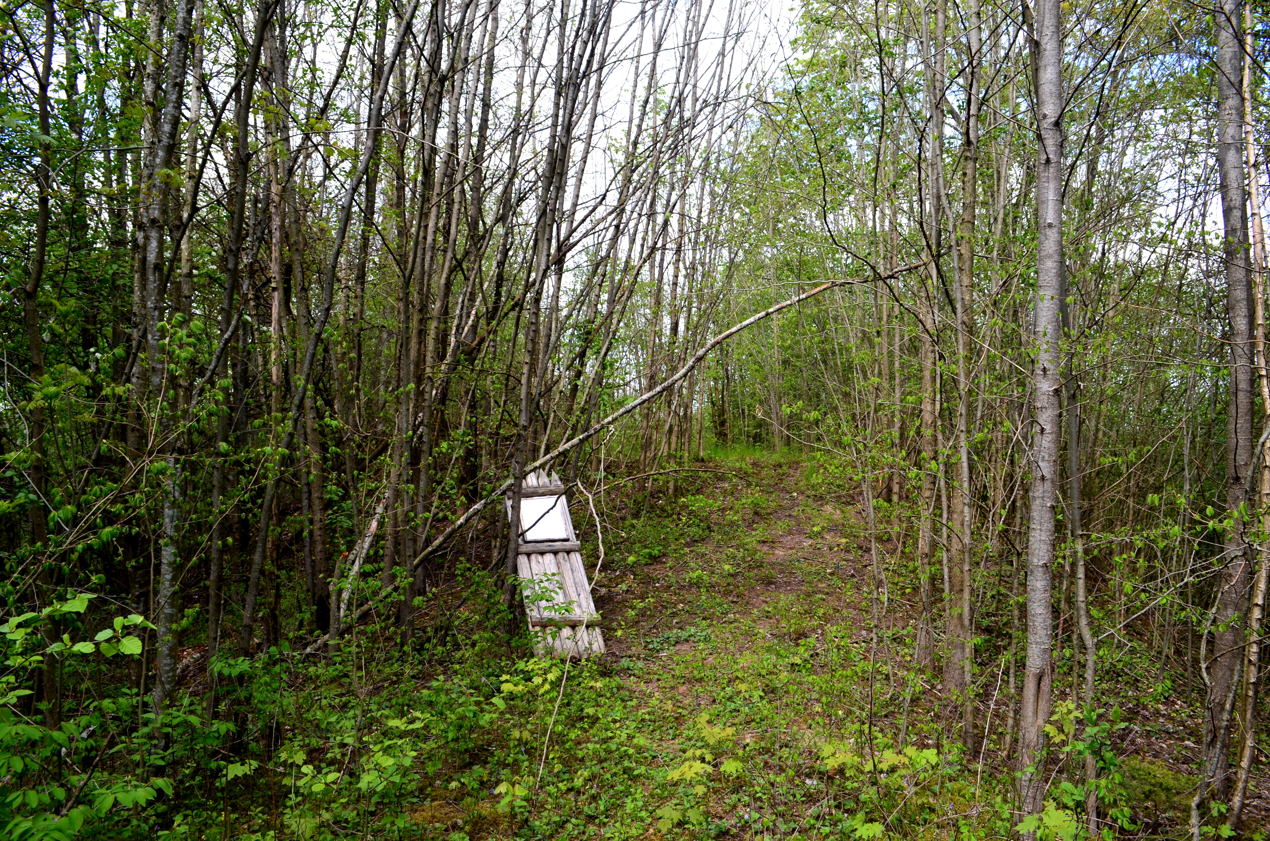 Žuklijų piliakalnio viršūnė, Šakių raj.